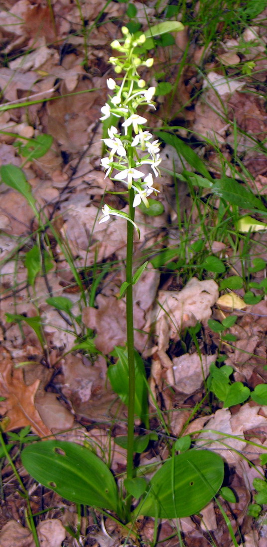 Dvilapė blandis (Platanthera bifolia) žiedas Šeima. Gegužraibiniai (Orchidaceae) Foto: Algirdas, 2006 m. birželio 20 d., Lietuva